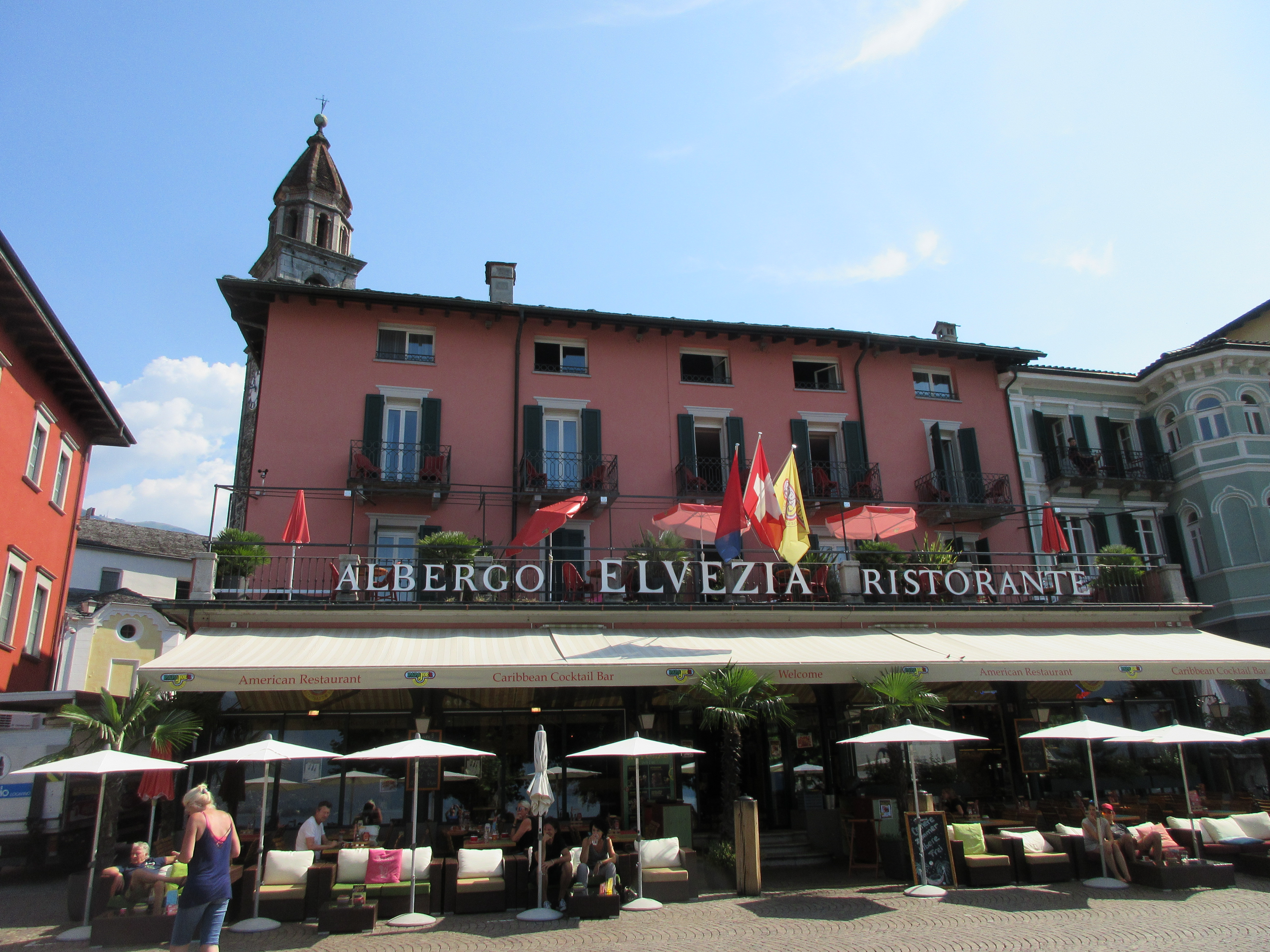 Hotel in Ascona, in dem am 7. Oktober 1925 das Gespräch zwischen Luther und Briand stattfand